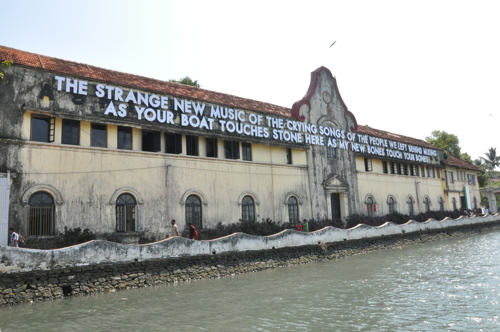 റോബർട്ട് മോണ്ട്ഗോമറിയുടെ വേഡ് ഇൻസ്റ്റളേഷൻ ആസ്പിൻ വാൾ കെട്ടിടത്തിന്റെ പുറകിൽ